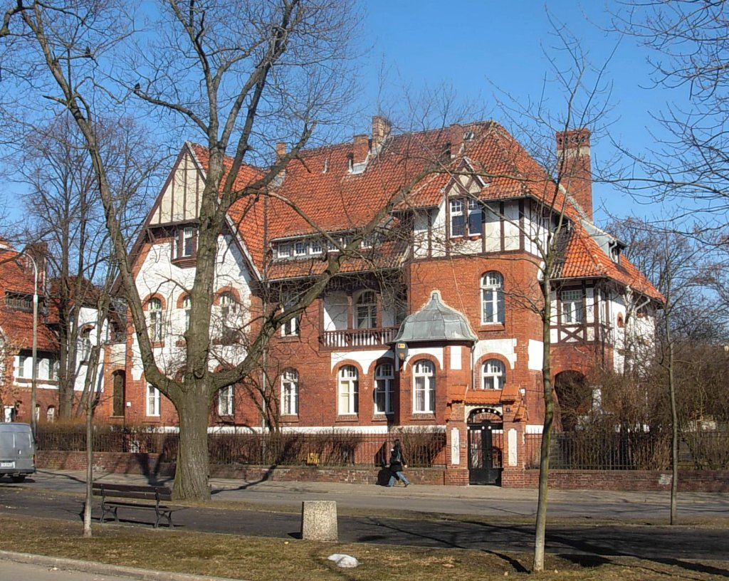 Instytuty Rolnicze w Bydgoszczy